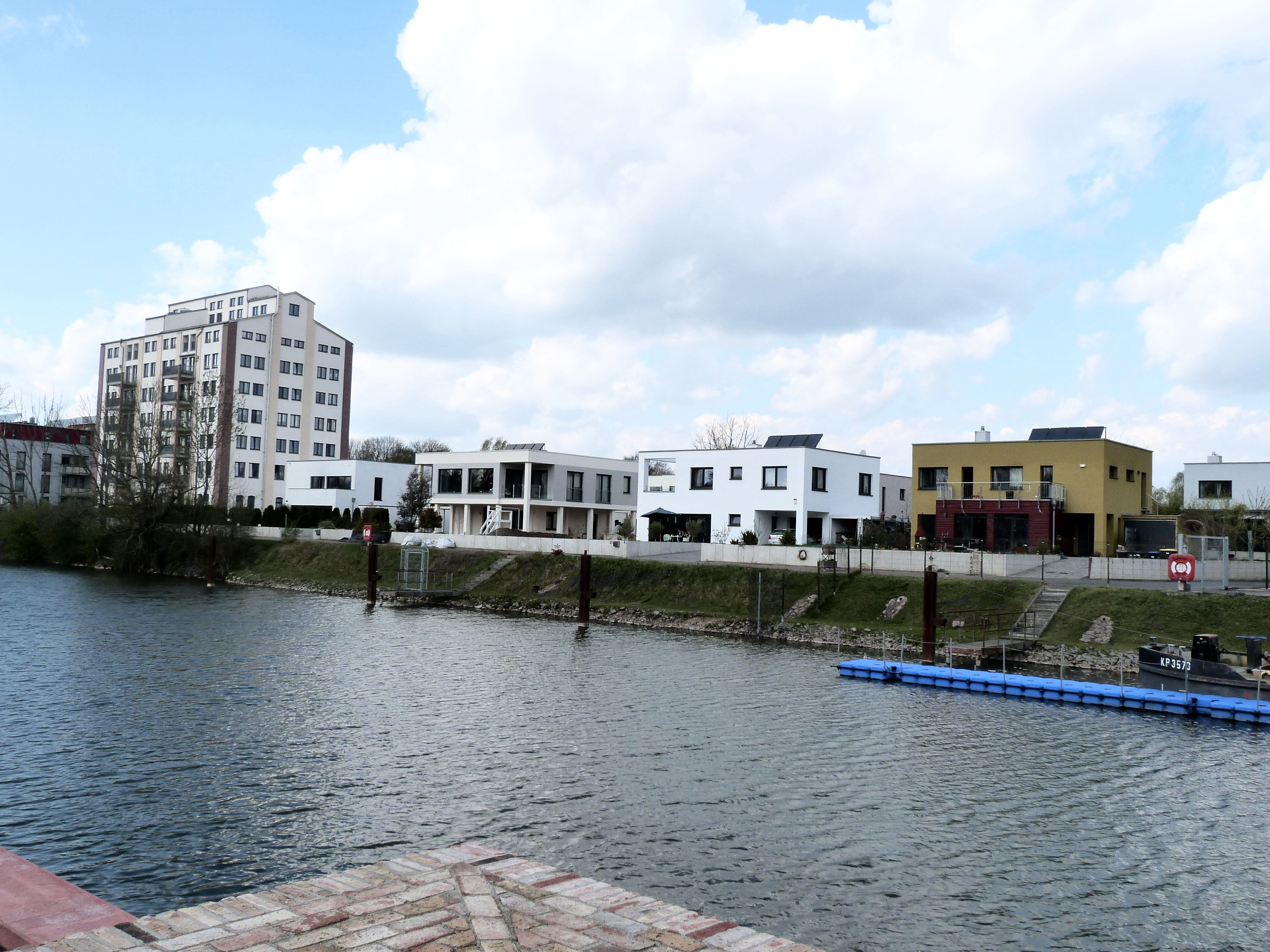 Neu errichtetes Wohngebiet in der Straße Am Sophienhafen, Halle (Saale)